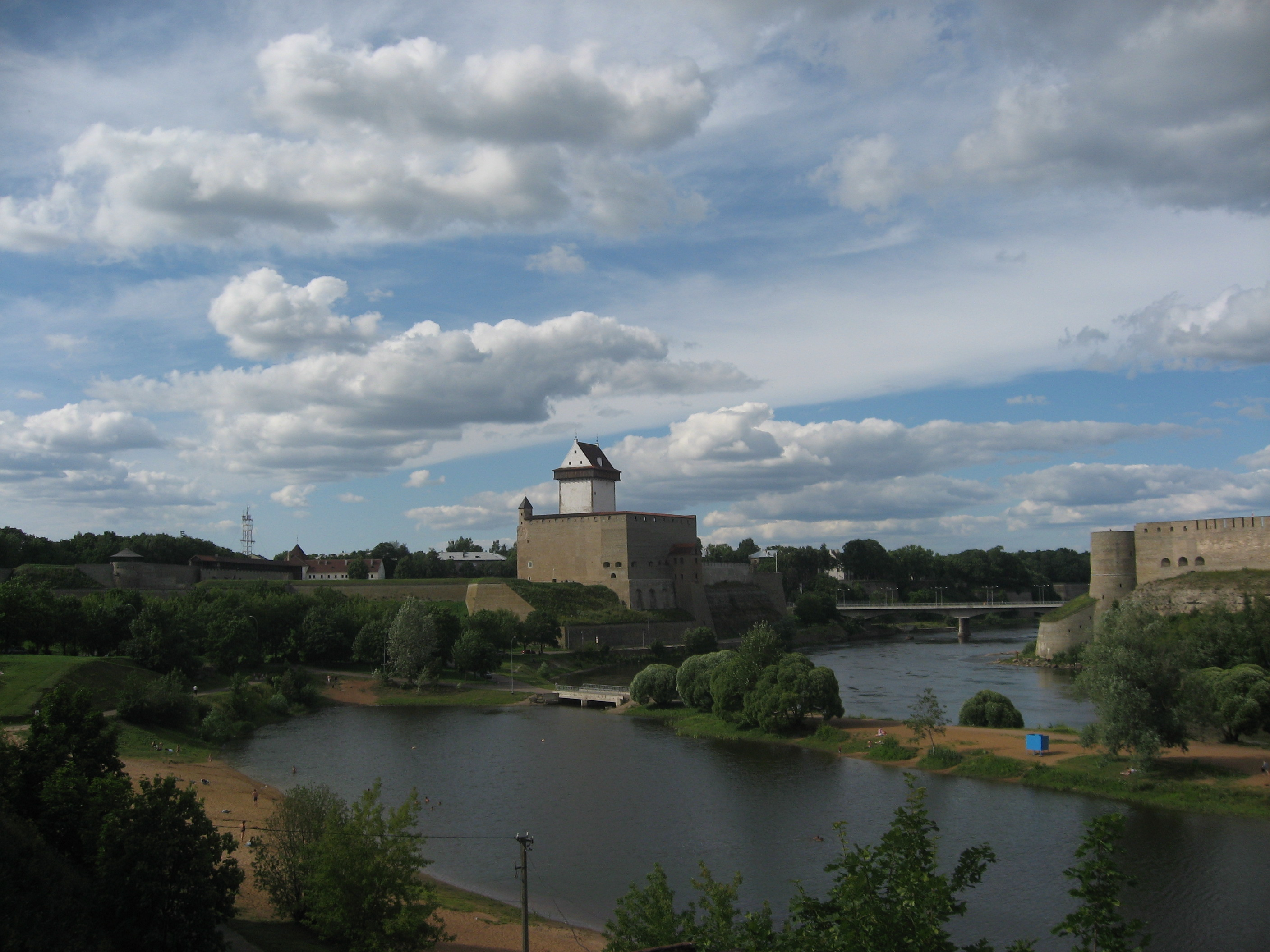 Narva, pevnost a řeka Narva